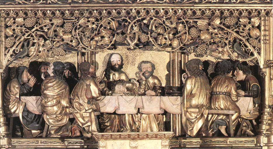 Posledná večera z predely hlavného oltára Chrámu sv. Jakuba